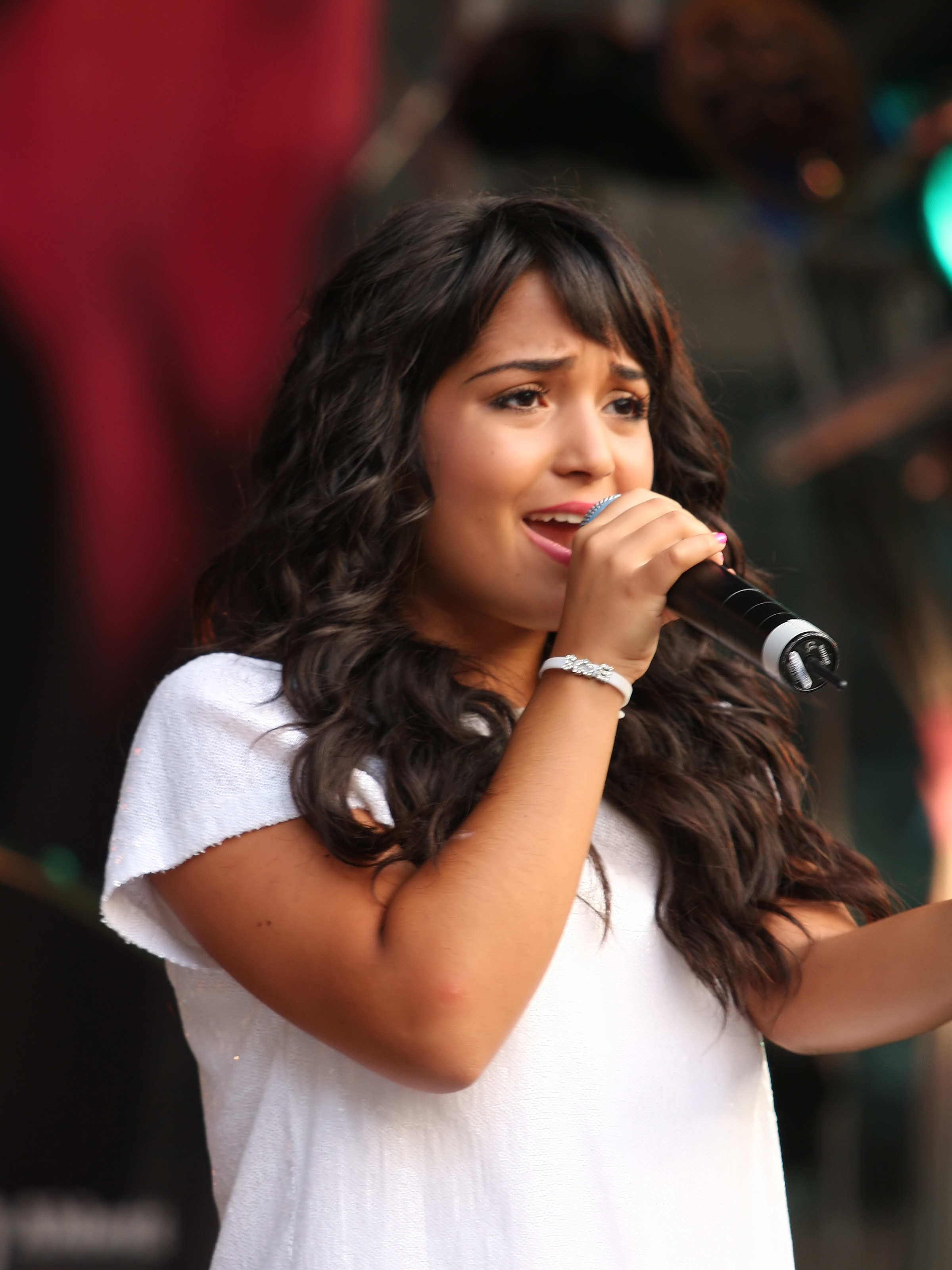 Die Gruppe „Monrose“ - Bahar Kızıl - auf der Hauptbühne auf dem Heumarkt, Köln. Bühnenprogramm zum CSD-Straßenfest/ColognePride 2009.